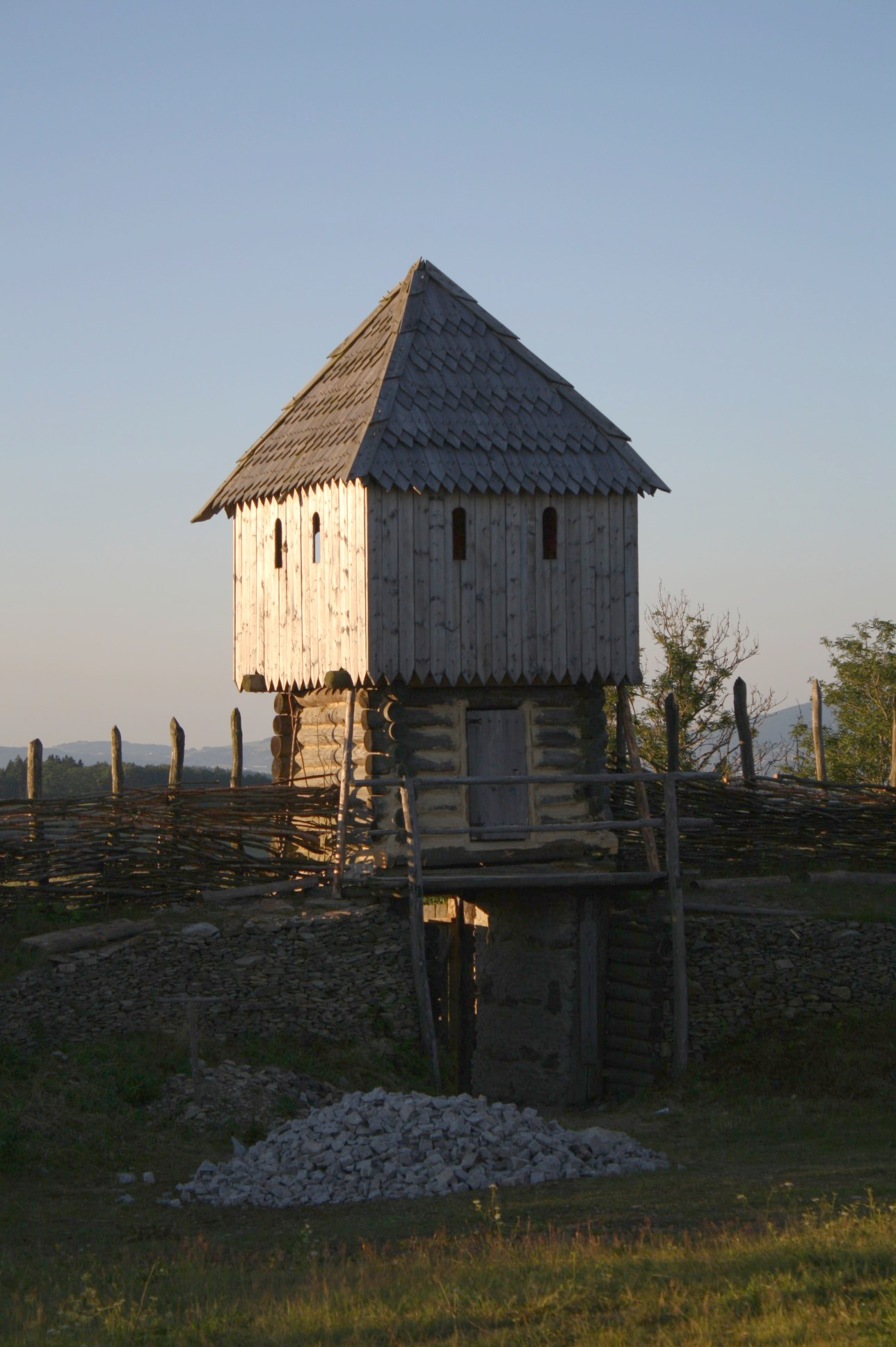 Vstupní brána volné repliky raně středověkého hradiště Curia Vítkov, pohled zevnitř hradiště, stav v létě 2012.